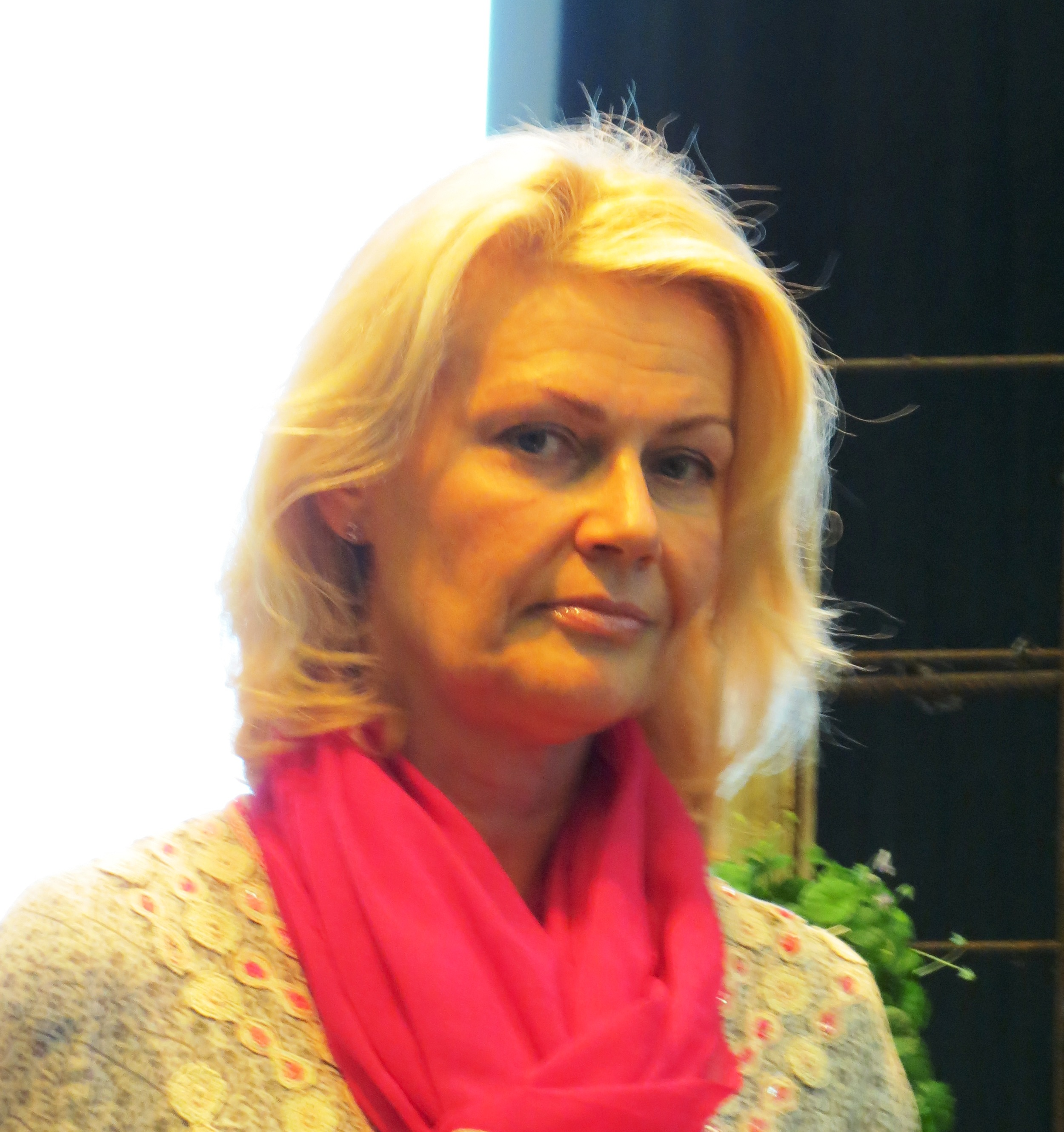 Svenska TV-programledaren Charlotte Permell.